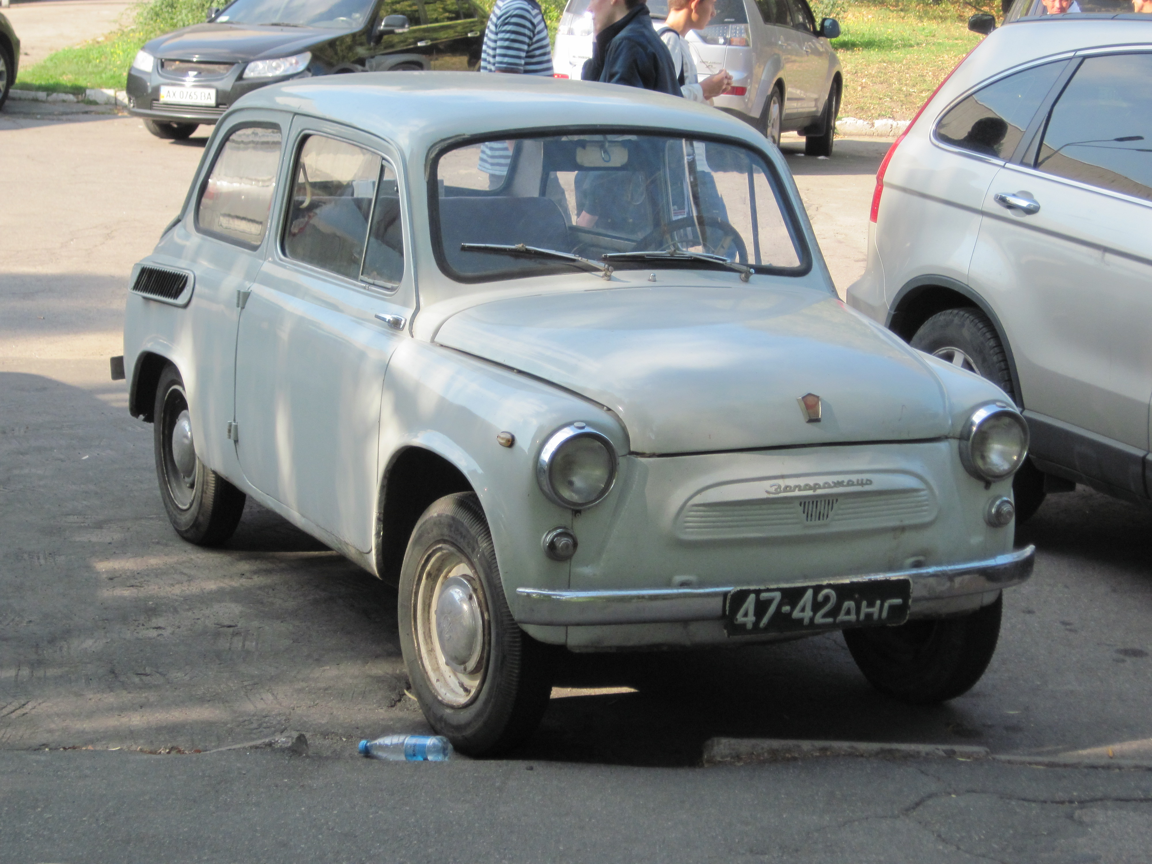 ЗАЗ-965А